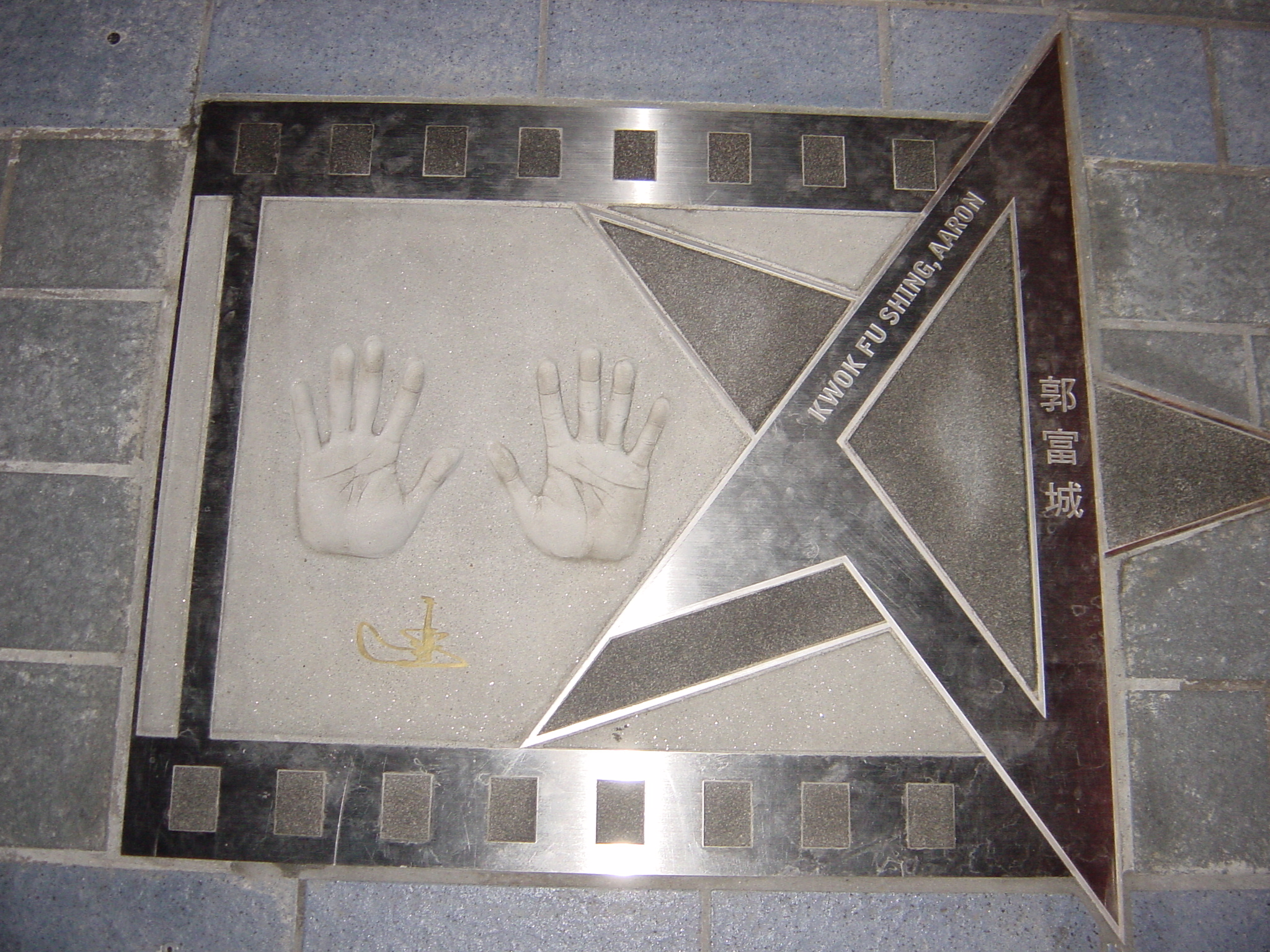 中文（香港）: 郭富城簽名掌印